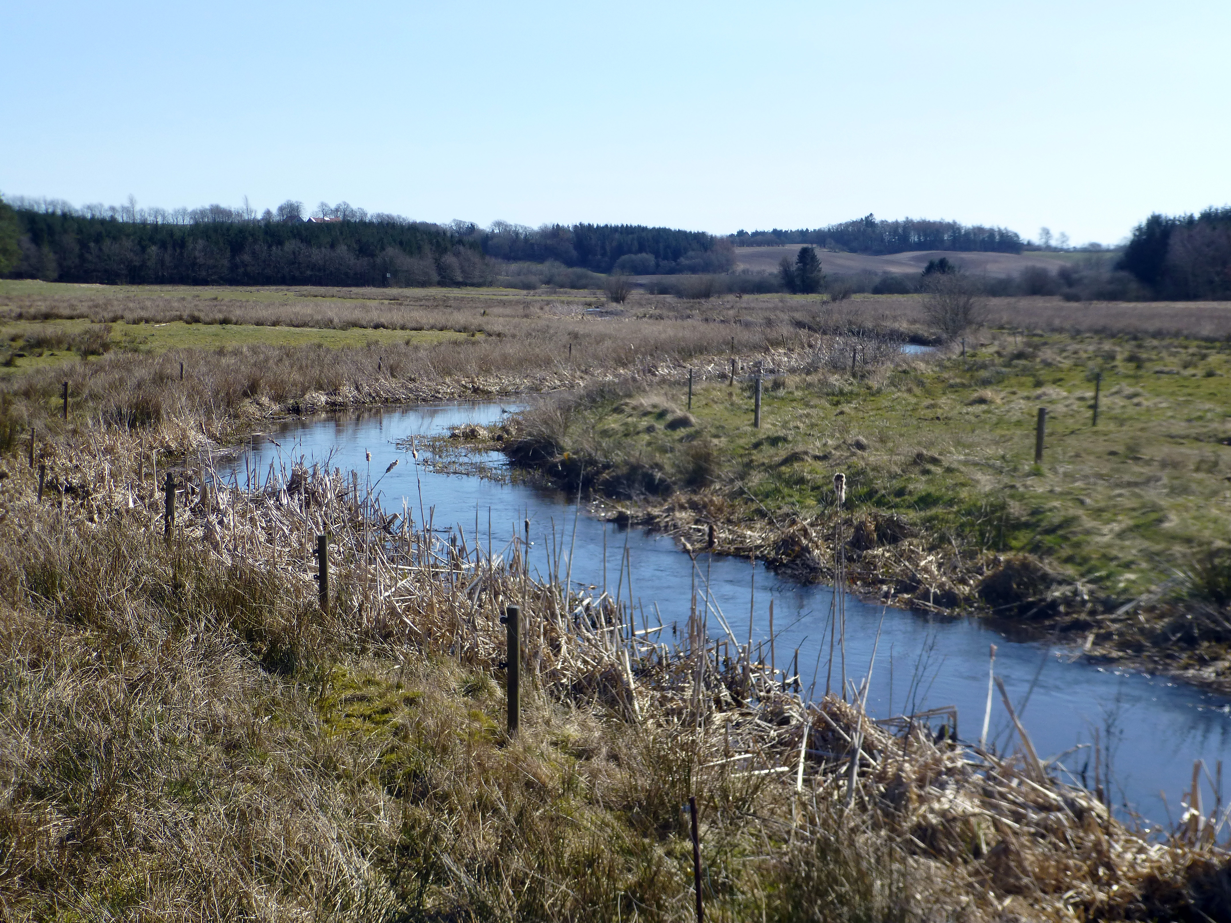 Mattrup Å kort efter udløbet fra Stigsholm Sø